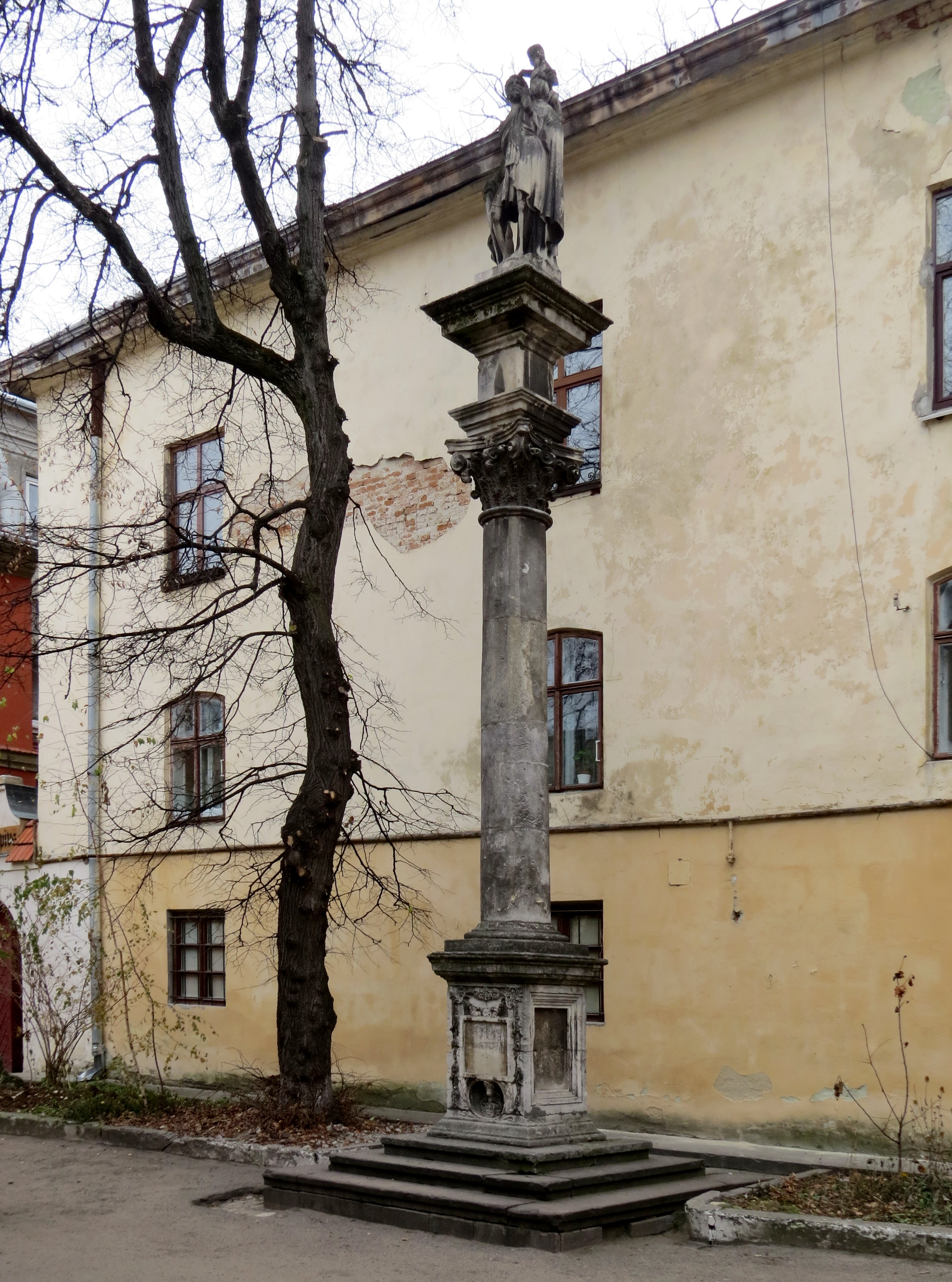 Вірменський собор - Колона Св. Христофора (1722 рік) - Львів (Вірменська, 7/9) Україна